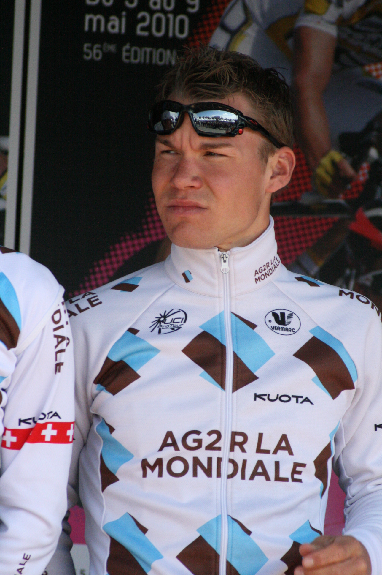 Kristof Goddaert, lors de la présentation des équipes des 4 jours de Dunkerque 2010